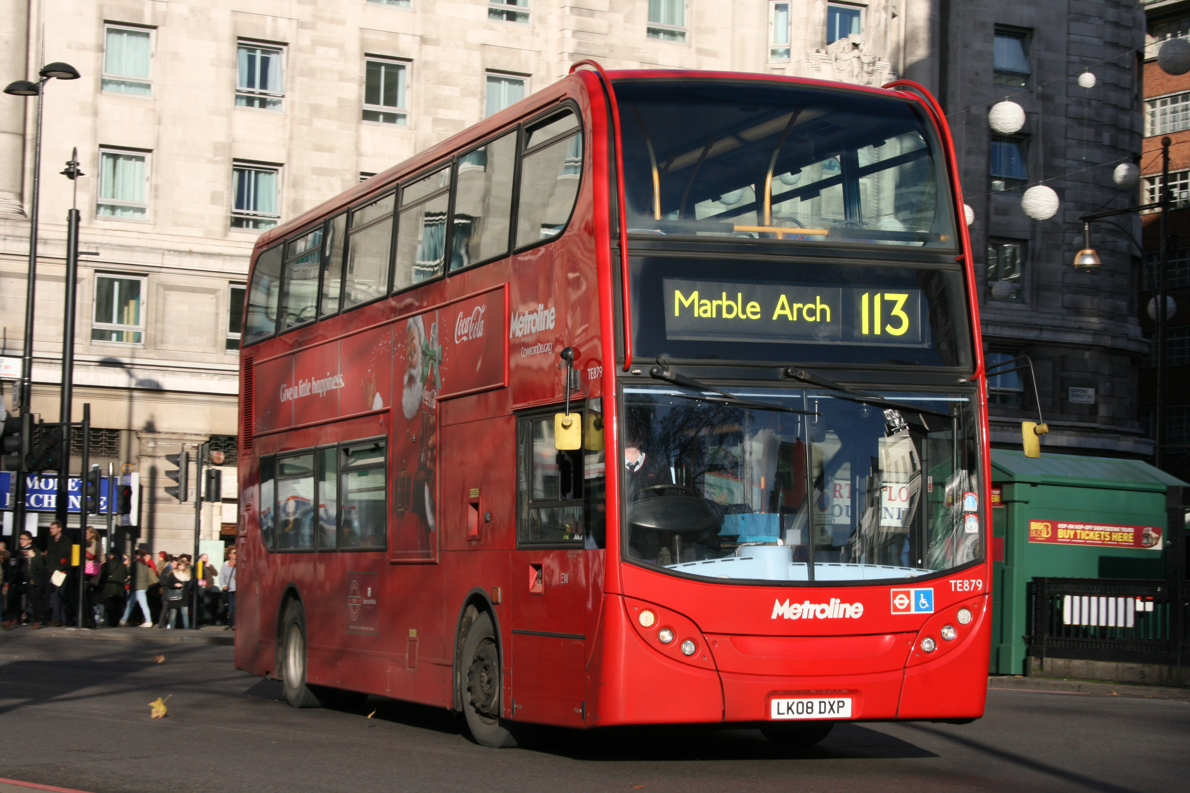 LK08 DXP